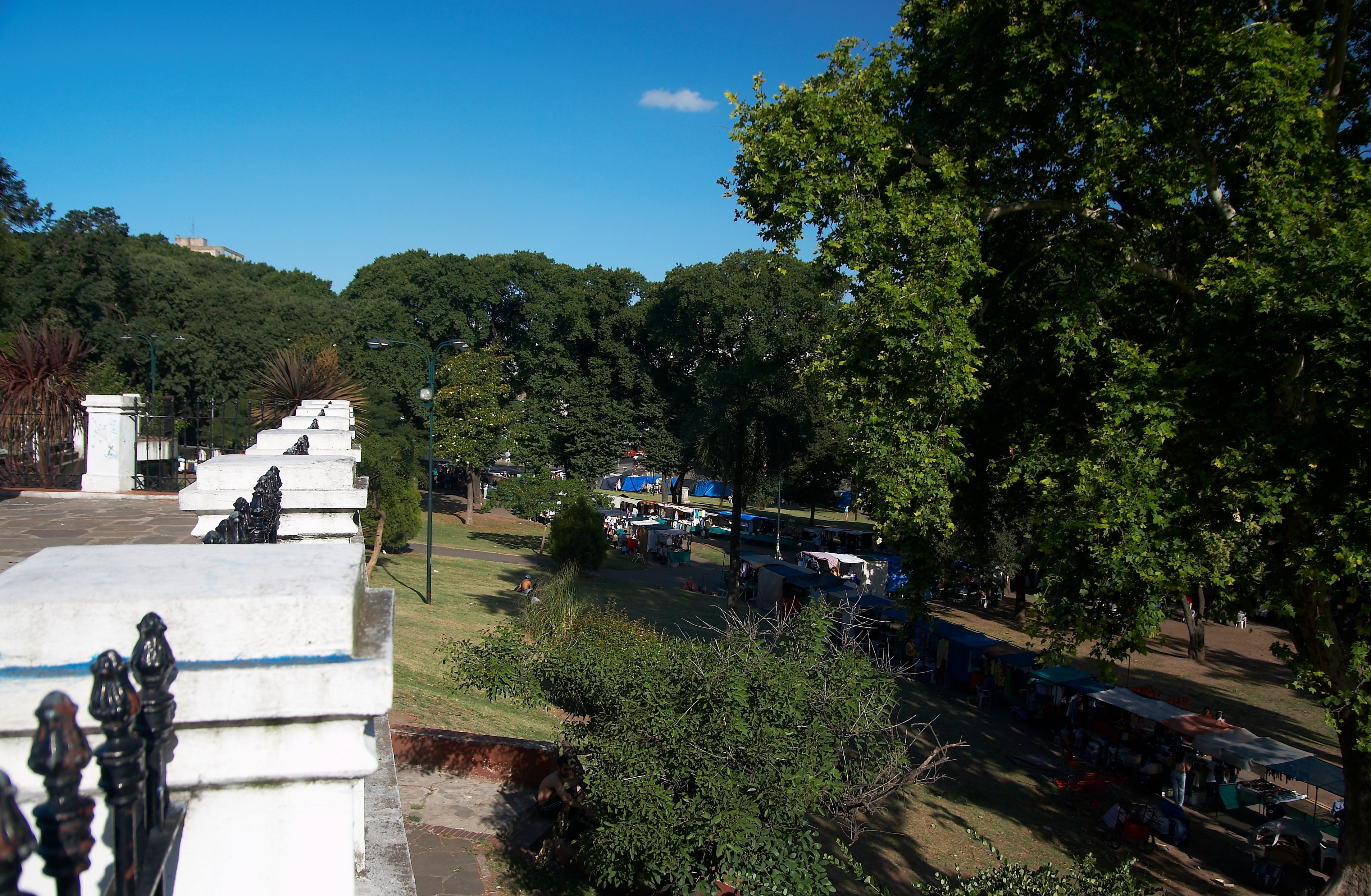 Parque Lezama, barrio de San Telmo, Buenos Aires, Argentina.